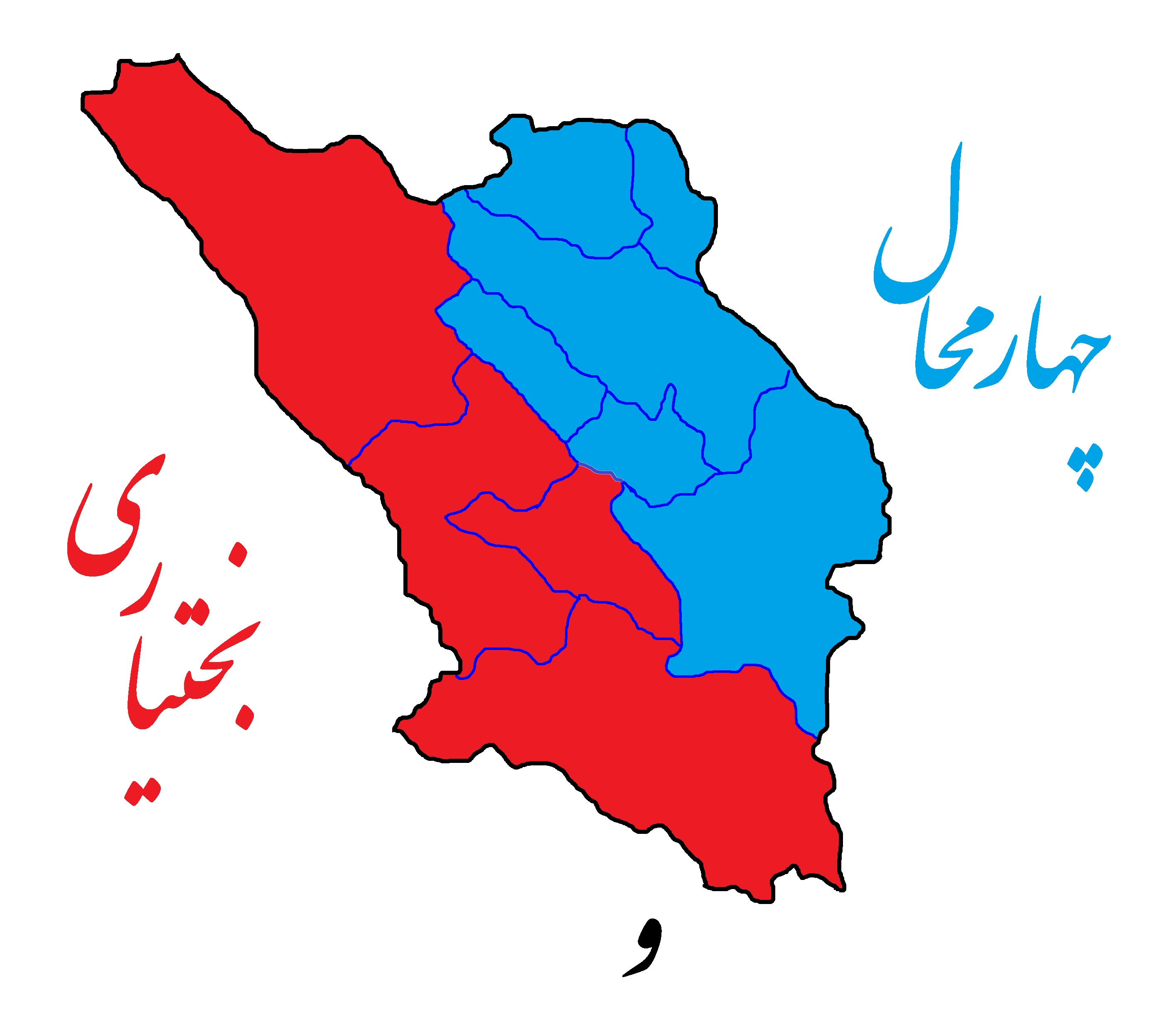 تقسیم بندی استان چهارمحال و بختیاری به دو منطقه چهارمحال و منطقه بختیاری/قسمت آبی: چهارمحال و قسمت قرمز: بختیاری